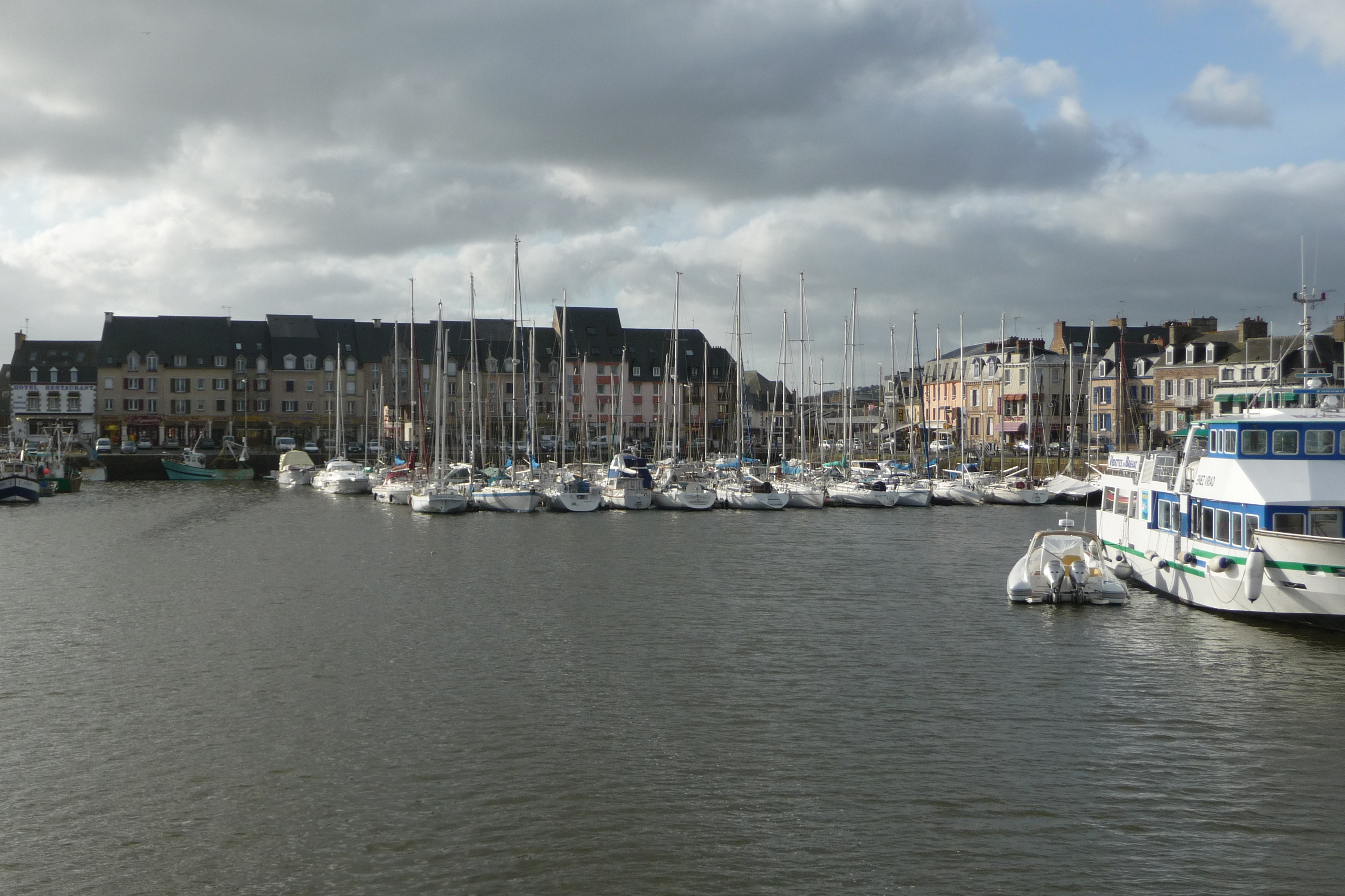 Le port de Paimpol vu depuis l'écluse.